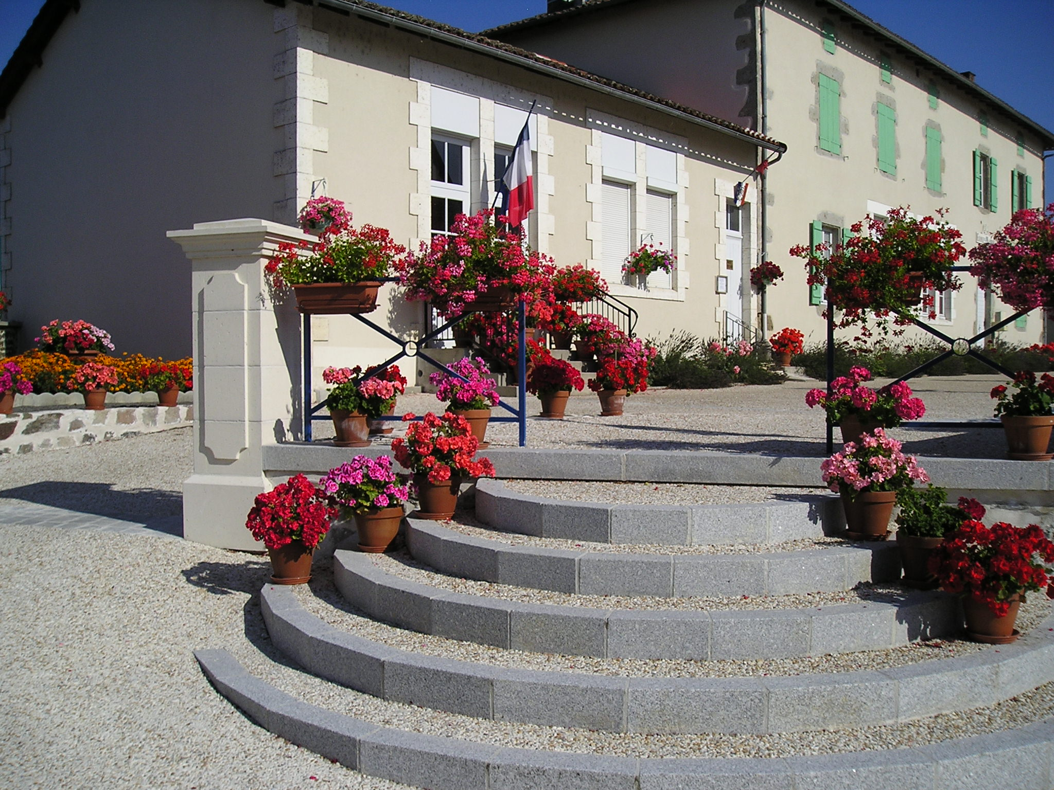 Mairie et anciennes écoles de Pressignac, Charente, France.